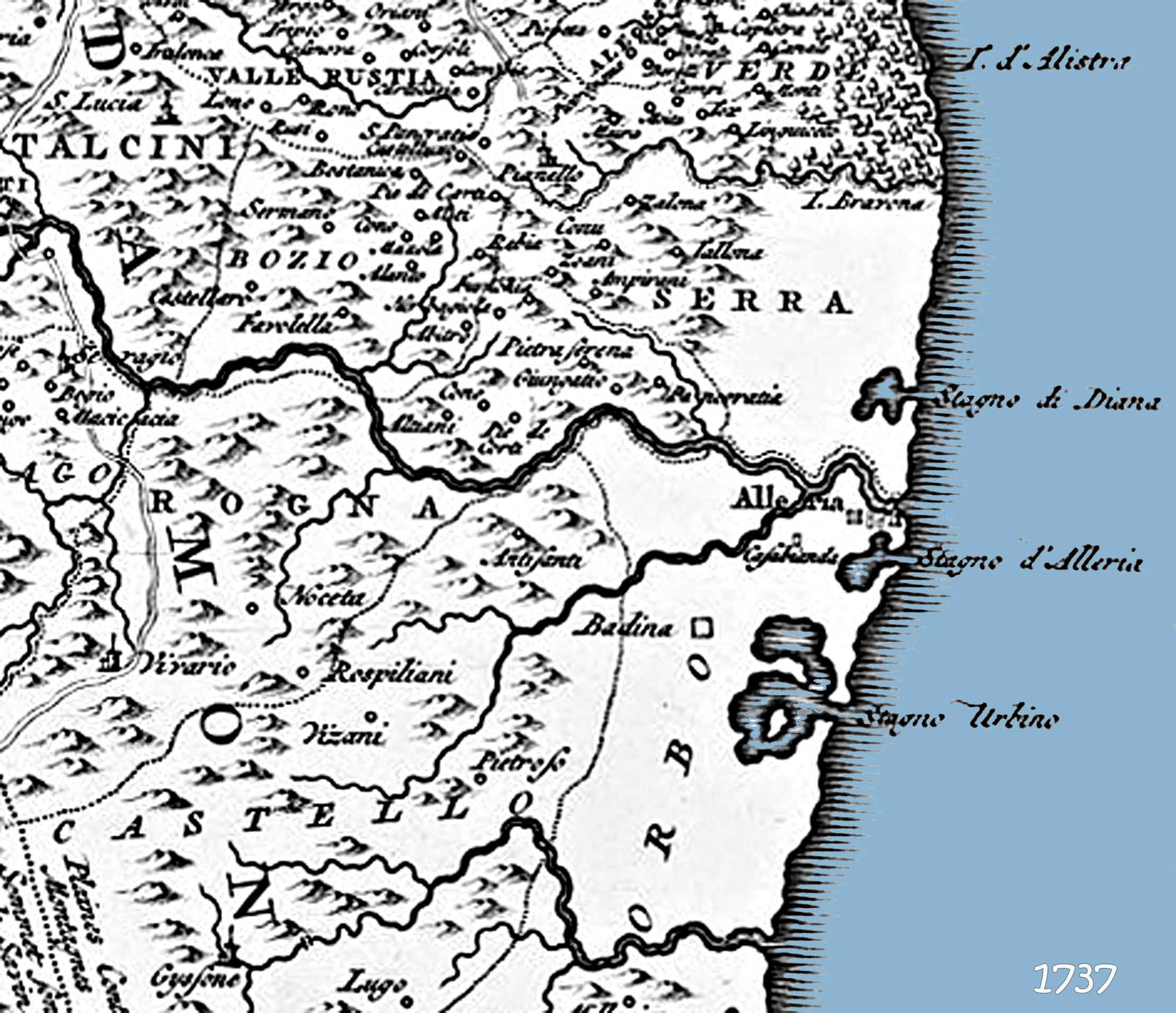 Extrait concernant la pieve de Serra et ses voisines, de la carte du capitaine Vogt (1737)